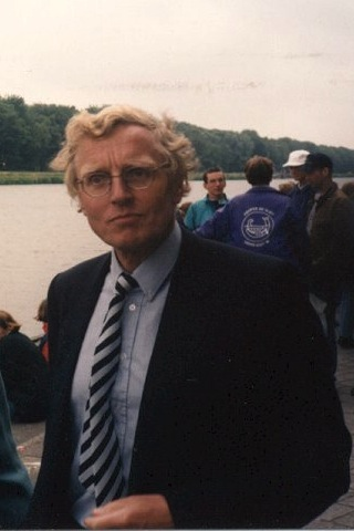 Tom Dronkert met Tritondas tijdens de NRSF/Slotwedstrijden van begin zomer 1996 op de Bosbaan in Amstelveen waar een Empacher dubbelvier in zijn naam gedoopt werd.